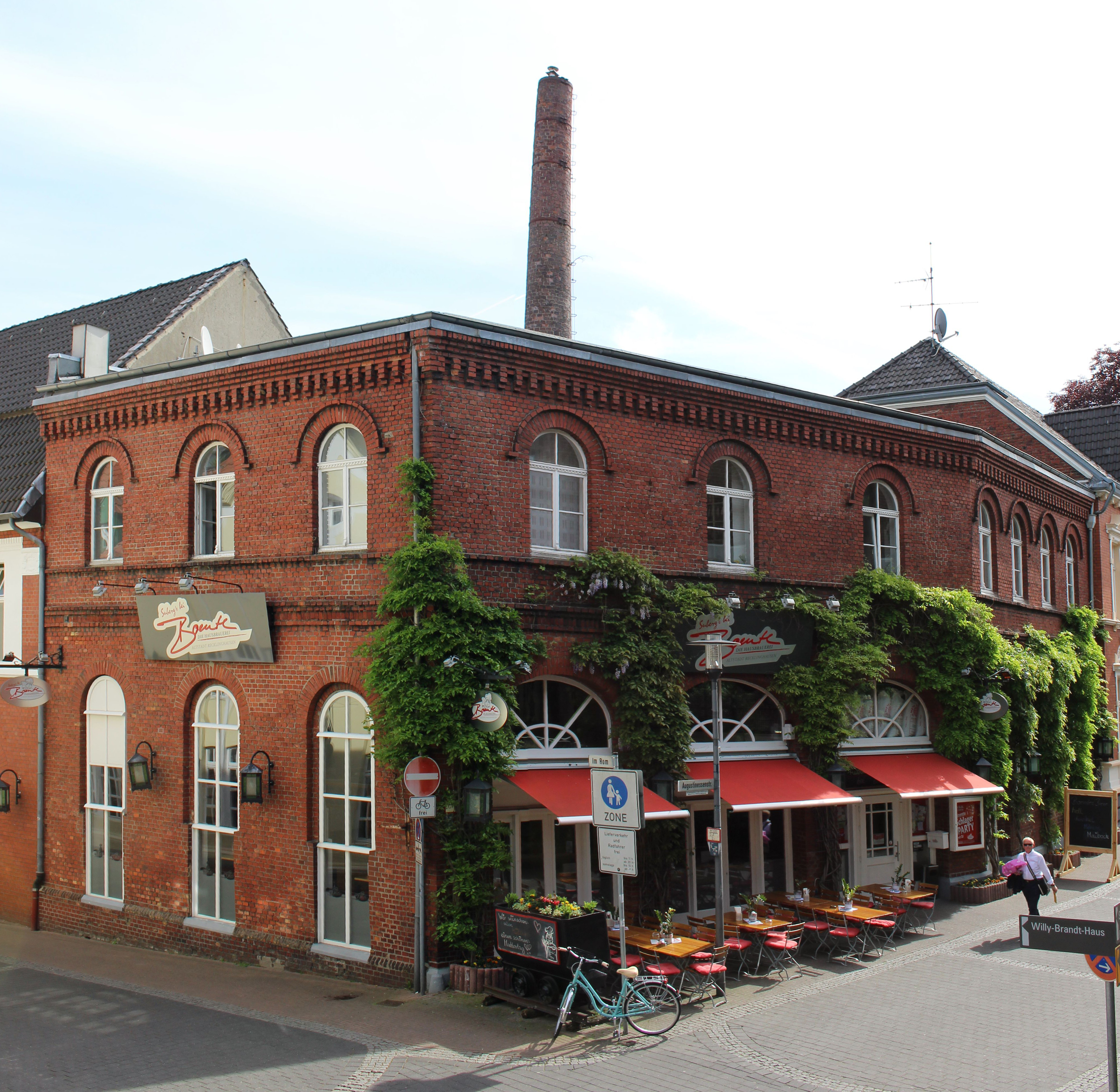 Kornbrennerei und Bar "Boente" in der Recklinghäuser Altstadt